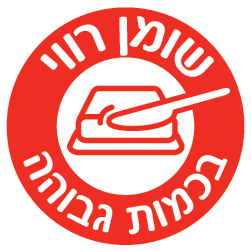 הסמל האדום שיוצג על פי הוראת משרד הבריאות על מוצרי מזון בעלי כמות שומן רווי גבוהה.